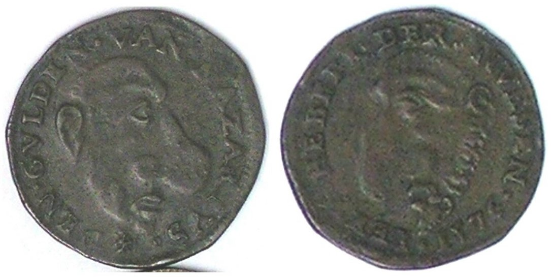 Dugniolle 2703. Satirieke rekenpenning op het afgebroken beleg van Neuss in 1475. Foto van eigen exemplaar.